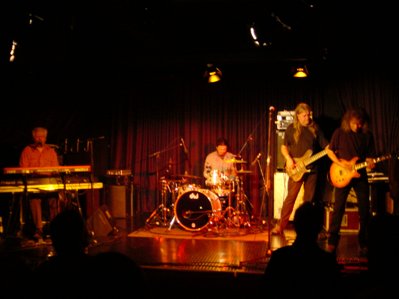 Die Band Engerling in der Kleinkunstbühne Q24 in Pirna